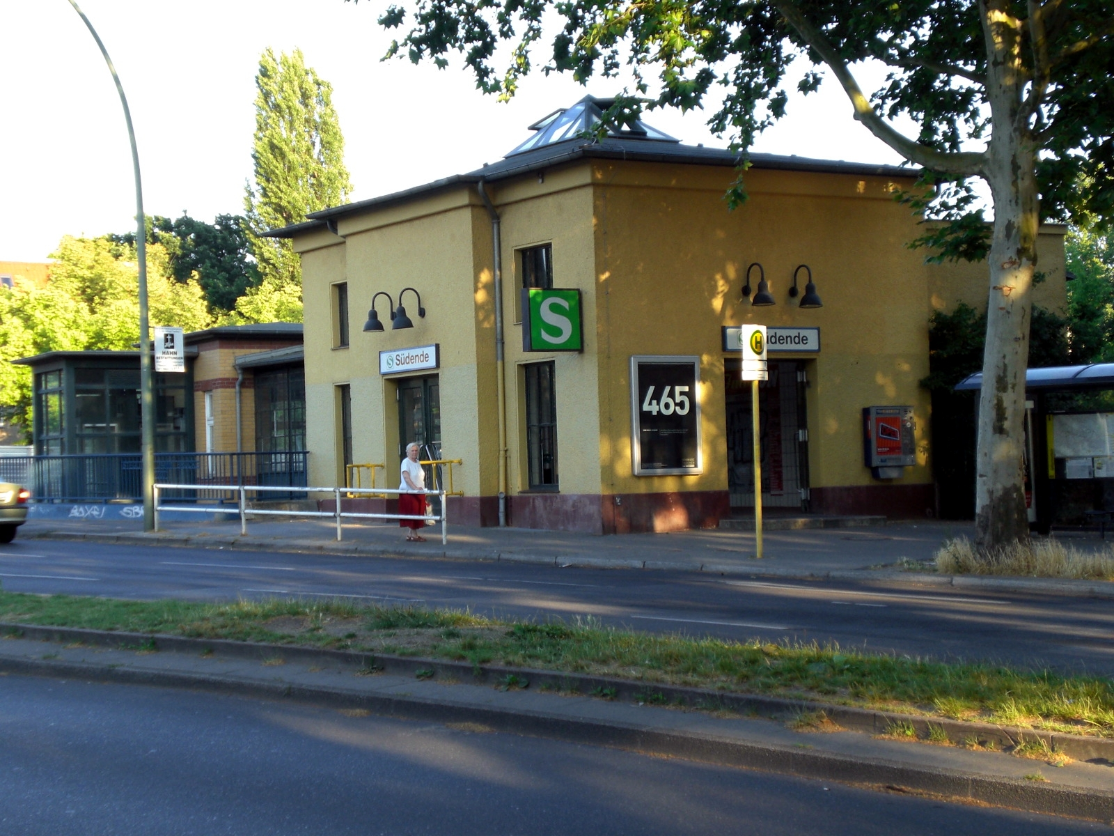 Empfangsgebäude S-Bahnhof Berlin-Südende, fotographiert über den Steglitzer Damm